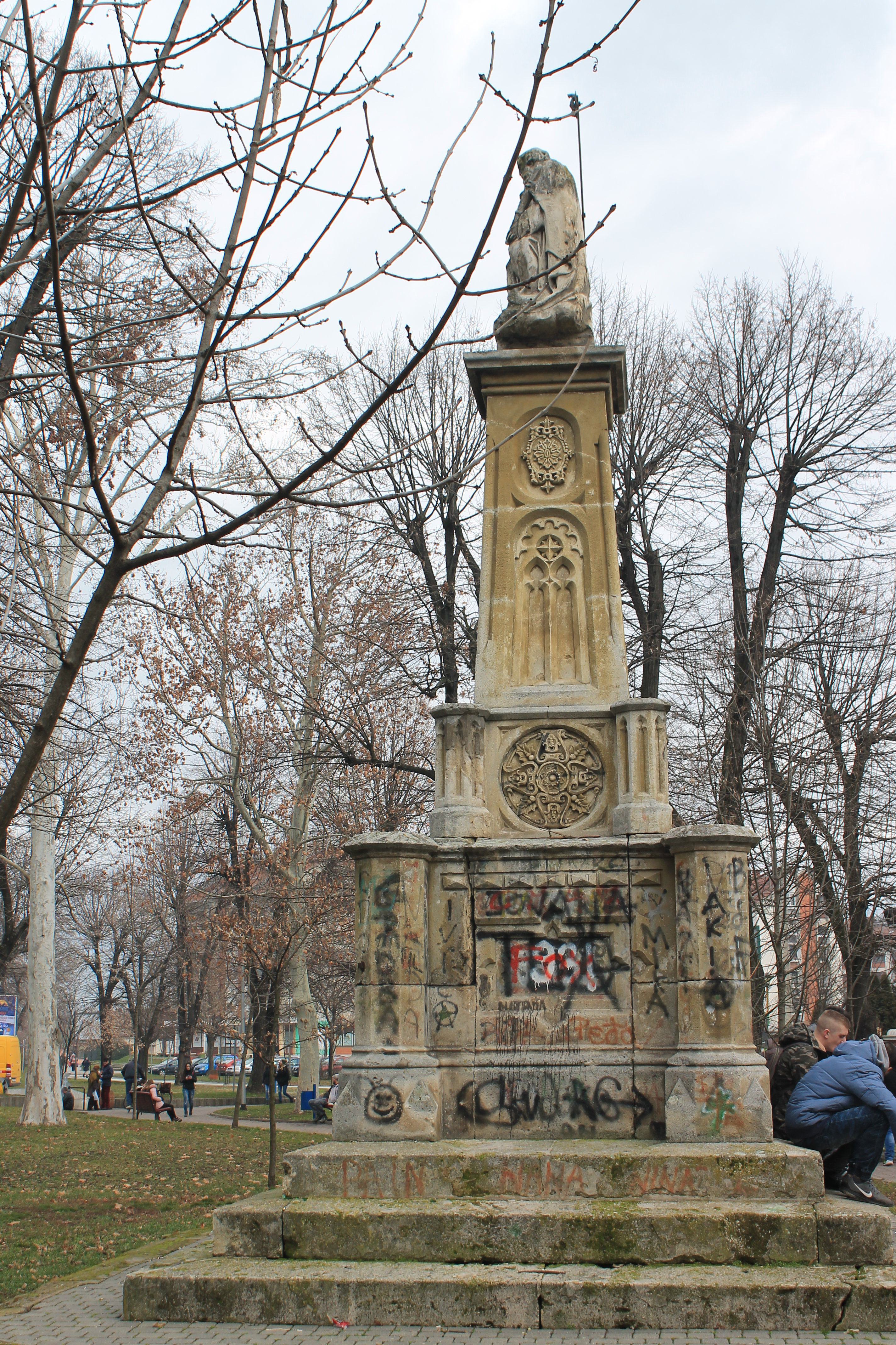 Spomenik Svetom Trojstvu, Sremska Mitrovica